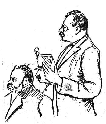 "Interrogatoire de M. Ducret".